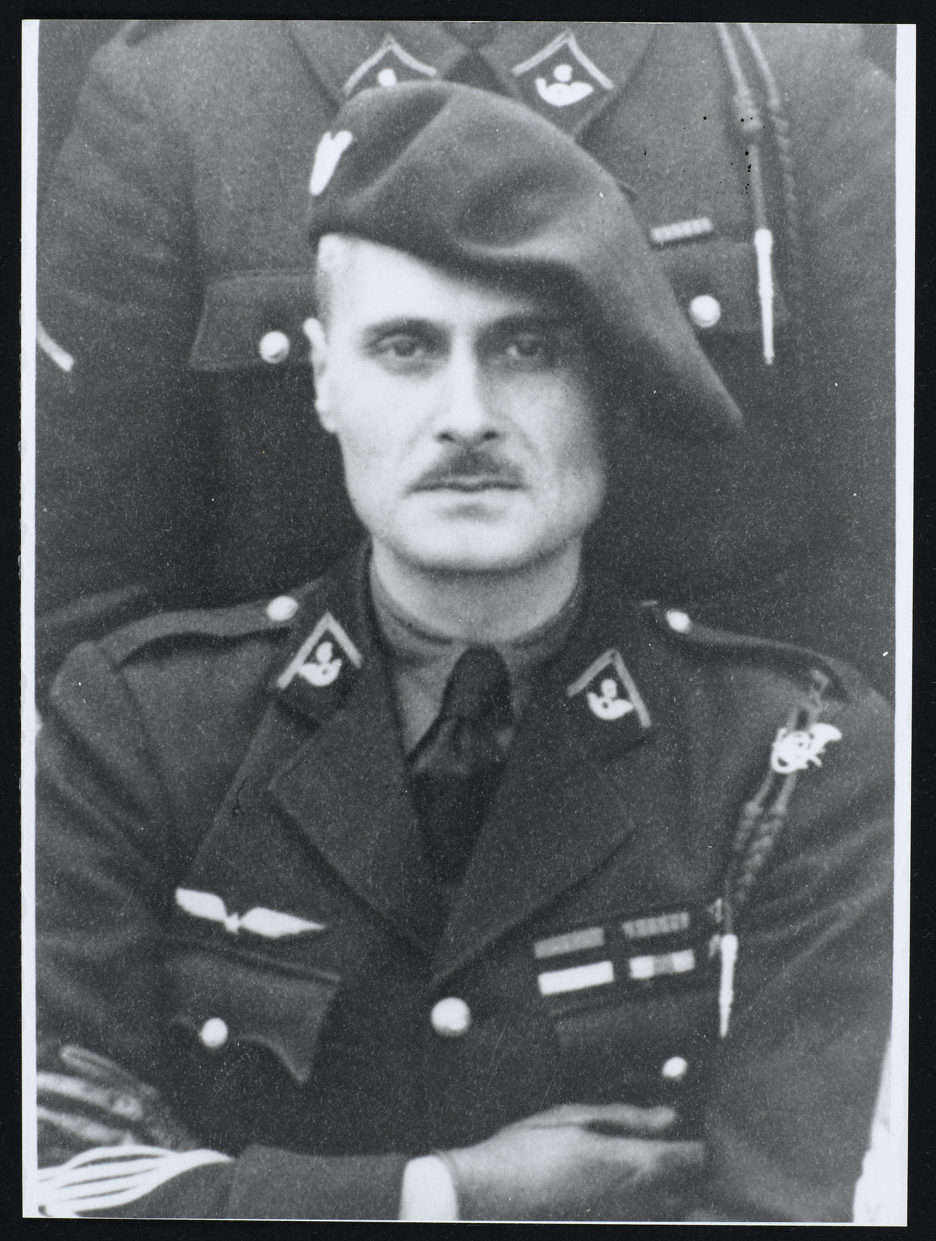 Albert de Seguin de Reyniès, dit "Sylvain"